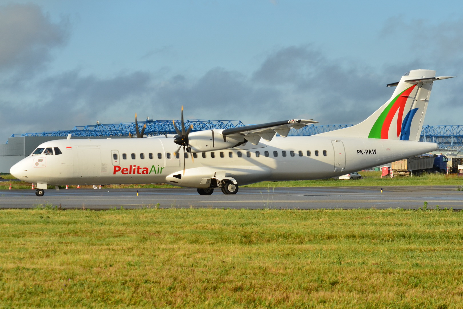 Photo prise à l'aéroport de Toulouse-Blagnac (LFBO) en France. Picture take at Toulouse-Blagnac Airport (LFBO) in France.